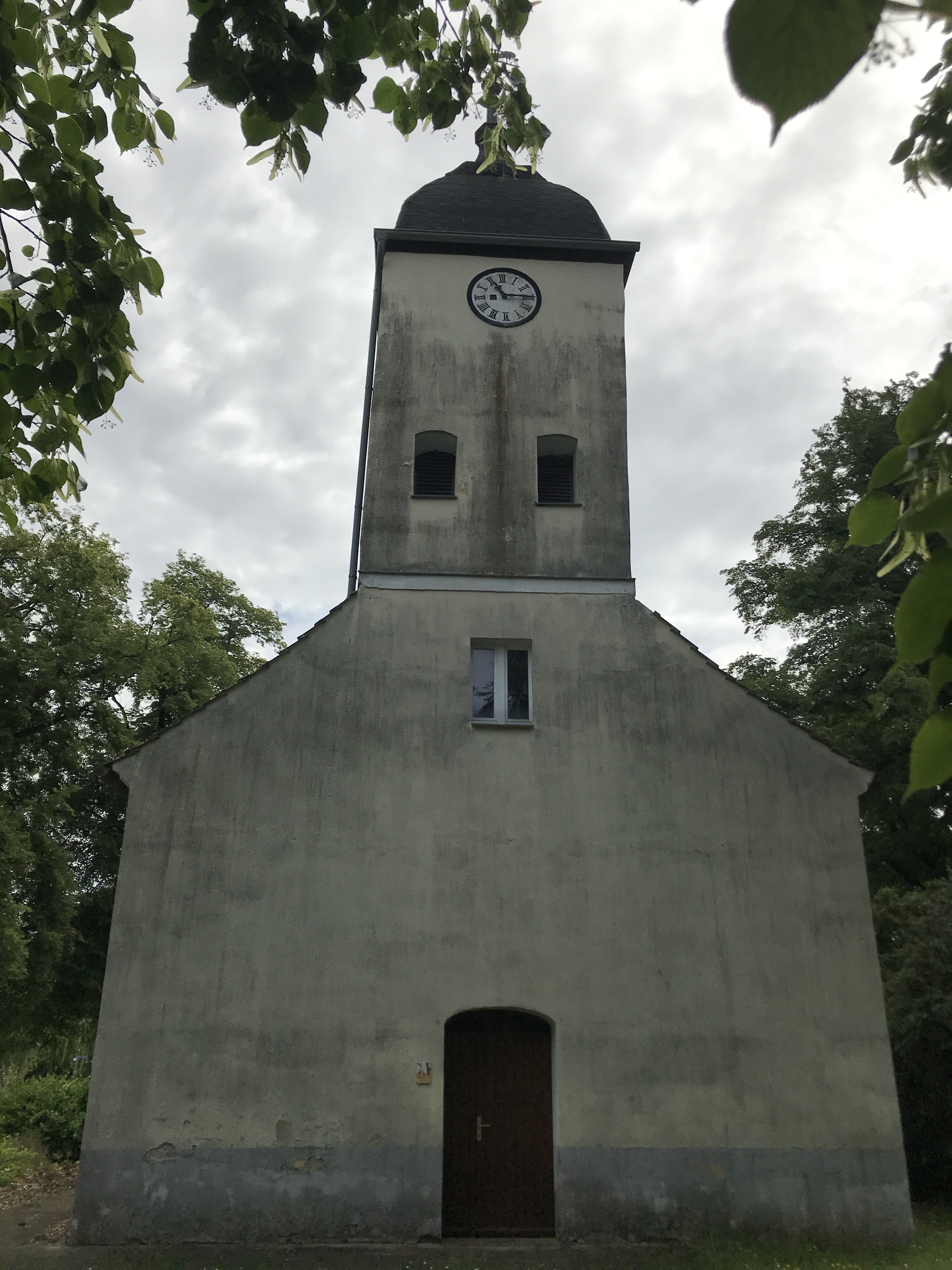 Die Dorfkirche Niebede entstand vermutlich Anfang des 18. Jahrhunderts in Niebede, einem Wohnplatz des Ortsteils Wachow der Stadt Nauen im Landkreis Havelland in Brandenburg. Die Kirchenausstattung ist teilweise älteren Datums.